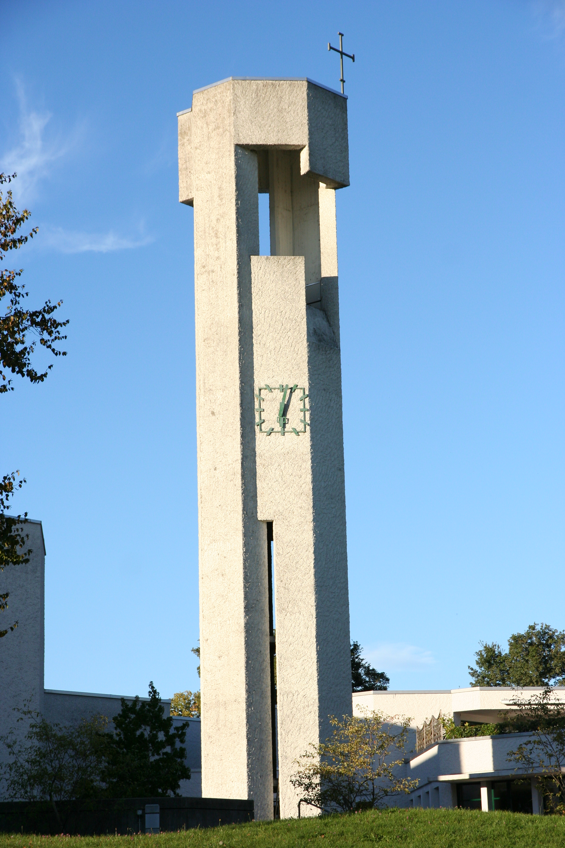 Römisch-katholische Kirche St. Peter und Paul Rotmonten